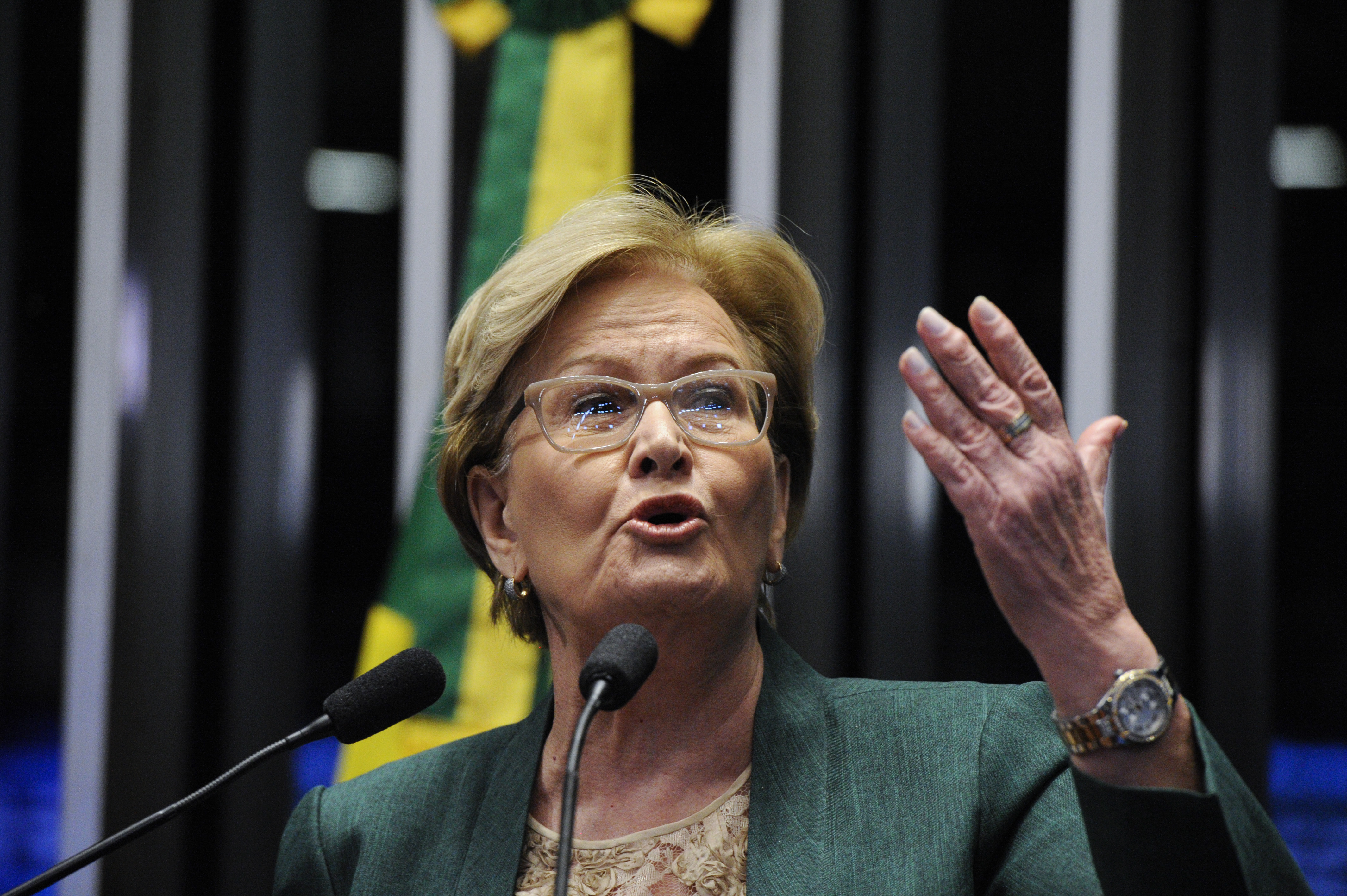 Plenário do Senado Federal durante sessão deliberativa extraordinária para votar a Denúncia 1/2016, que trata do julgamento do processo de impeachment da presidente afastada Dilma Rousseff por suposto crime de responsabilidade. Em discurso, senadora Ana Amélia (PP-RS) faz encaminhamento a favor do impeachment da presidente afastada Dilma Rousseff. Ela destaca a atuação da sociedade na fiscalização dos políticos e diz que o Brasil sairá diferente desse processo. Foto: Edilson Rodrigues/Agência Senado